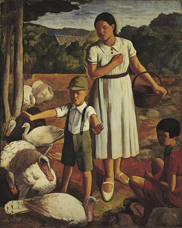 這是現存最大幅李梅樹油畫作品，既生動又有趣的親子圖，小孩逗弄著火雞，火雞咕嚕咕嚕的叫，媽媽親切又慈祥的呵護著，就連一旁的姊姊，都是一副悠哉的模樣，好不愜意！ 李梅樹以後期印象派如高更表現人物風景的手法，刻意省去瑣碎的筆觸，以大塊面的光影及色彩表現，強化了大幅畫作的氣勢。為了創作此畫，李梅樹先繪製了好多草圖，由此也可以瞭解李梅樹的嚴謹創作態度。